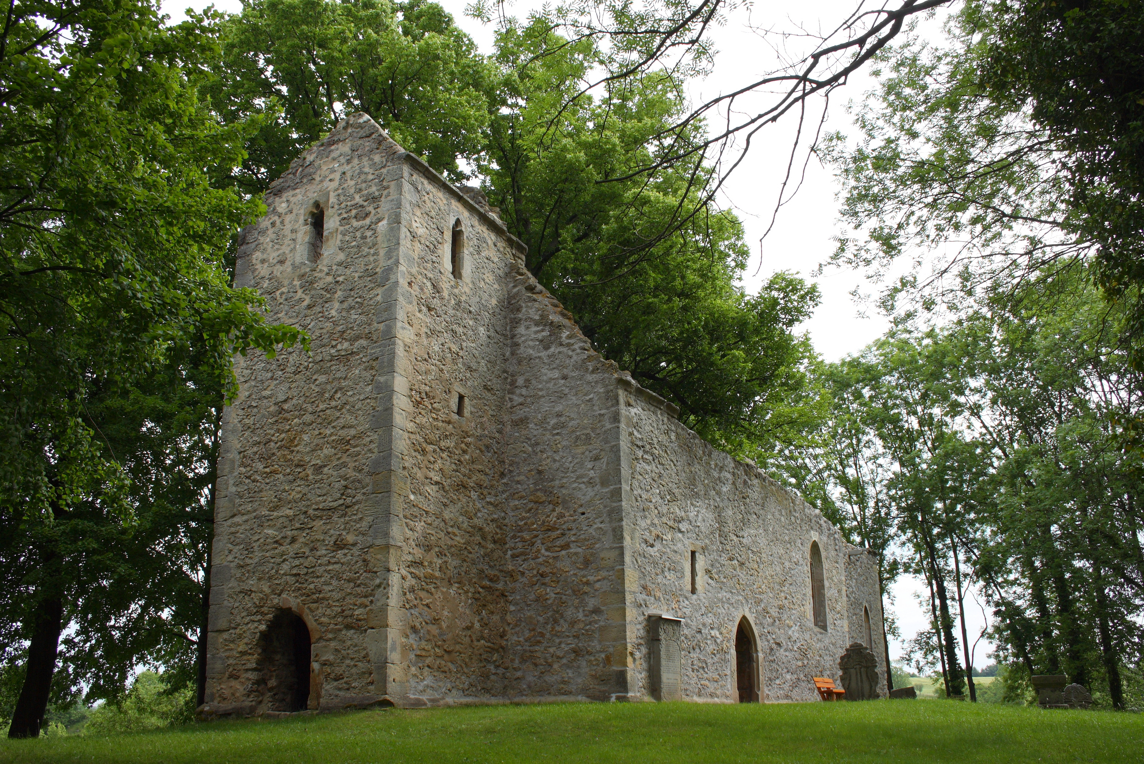 Die "Totenkirche", ehemalige evangelische Pfarrkirche von Abterode, einem Ortsteil von Meißner im Werra-Meißner-Kreis (Hessen), aus dem 14. Jh.